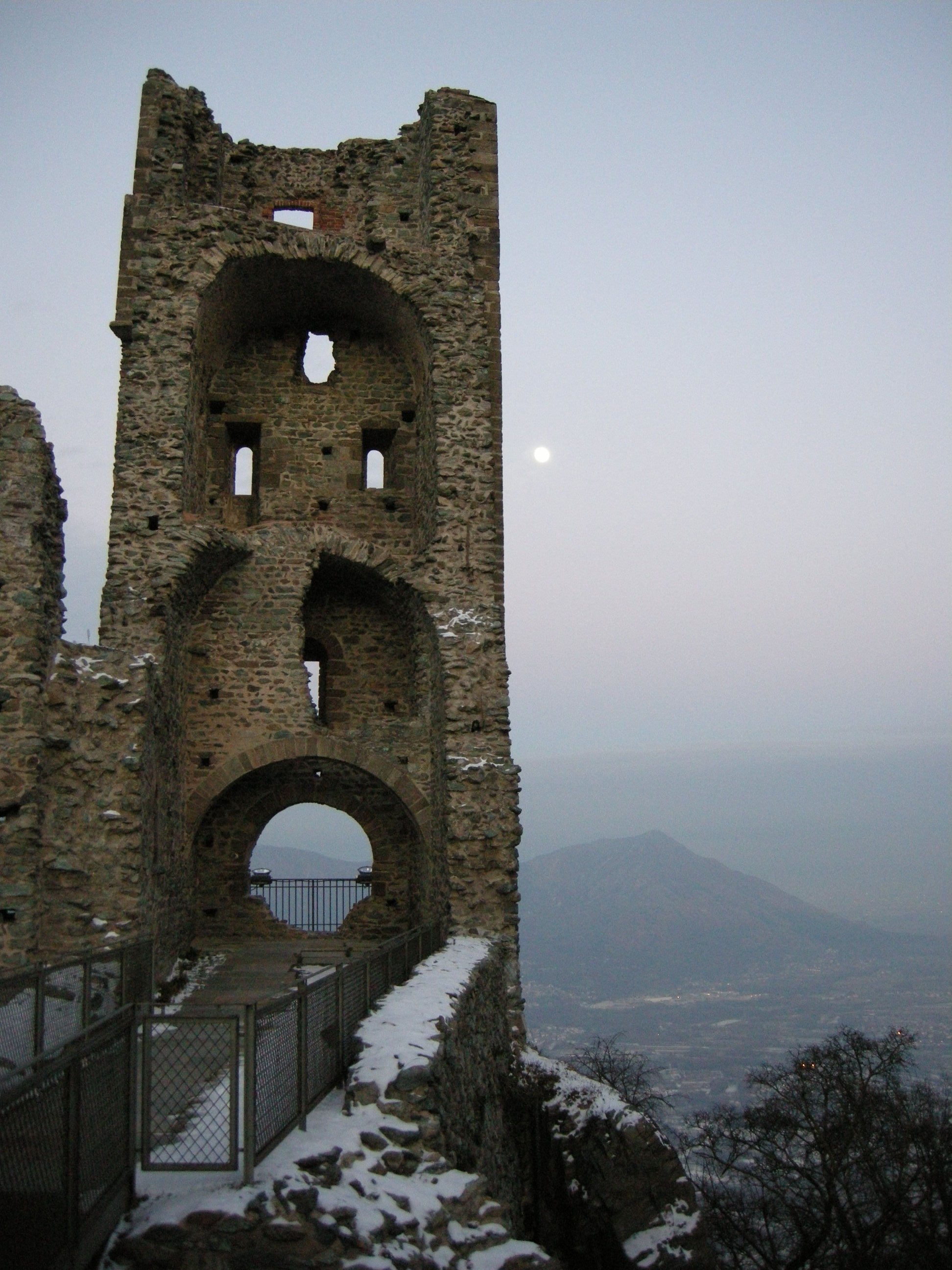 Sacra di san michele 12 torre della bell'alda